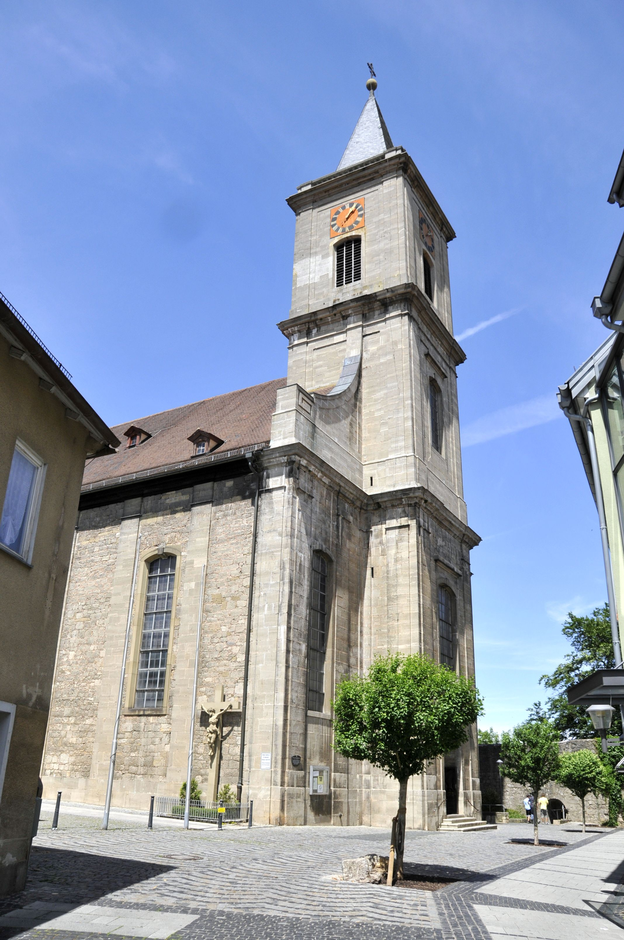 Kirche Mariä Himmelfahrt in Neustadt an der Saale